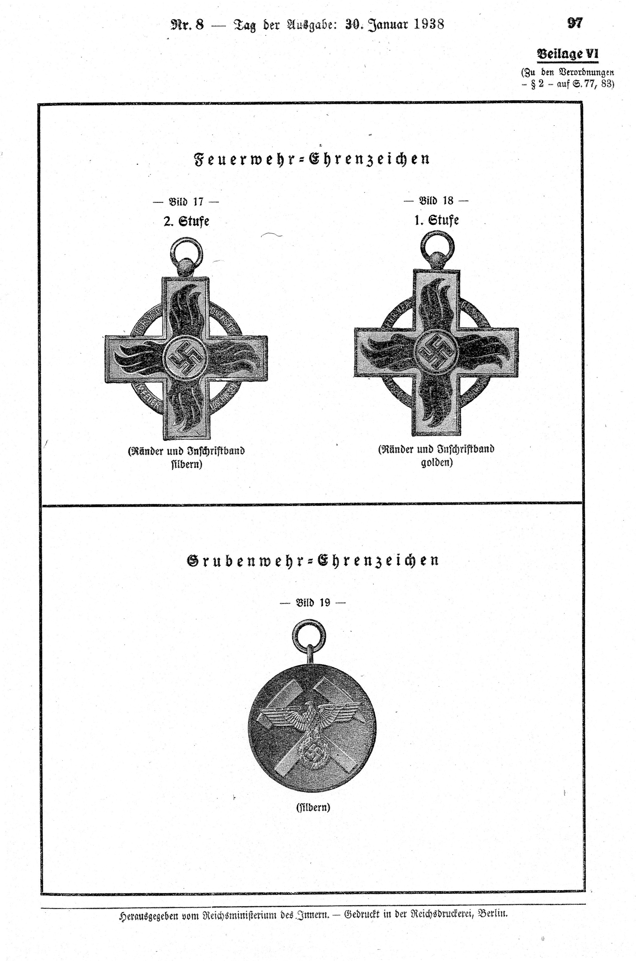 Reichsgrubenwehr-Ehrenzeichen Teil III